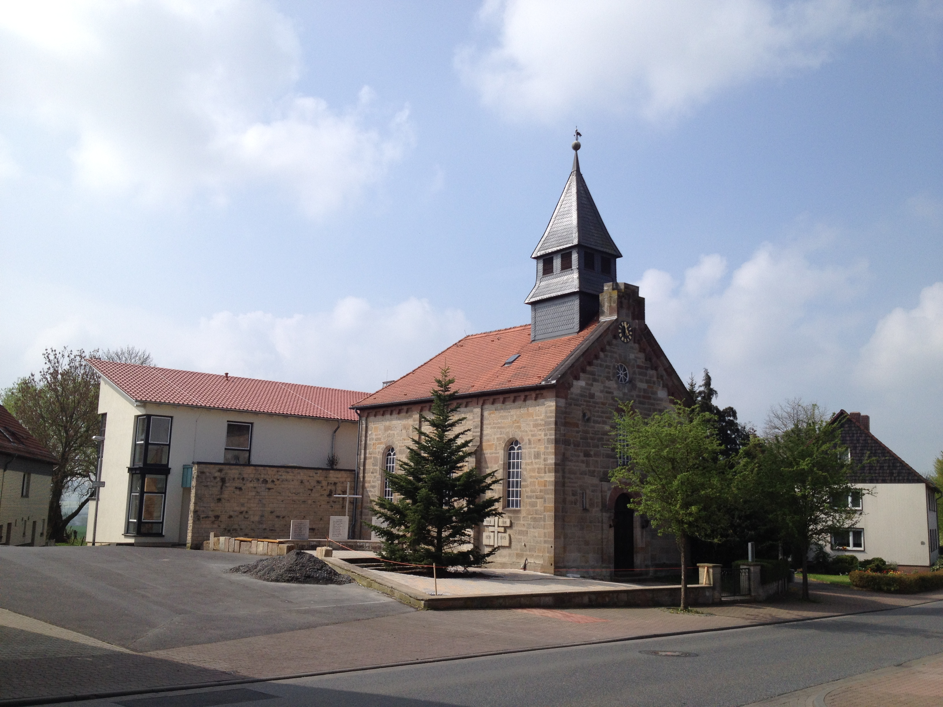 Der Eco Pfad Kulturgeschichte Hertingshausen und Kirchbauna an der evangelischen Elisabethkirche in Hertingshausen